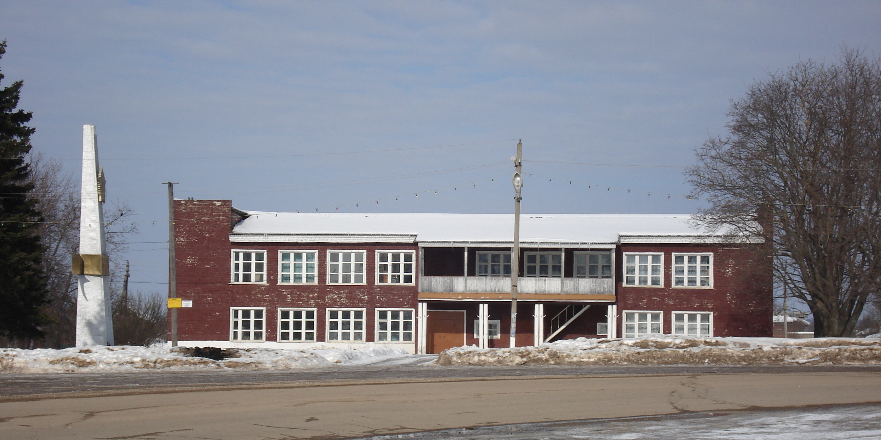 Сельский клуб и стела памяти Великой Отечественной войны